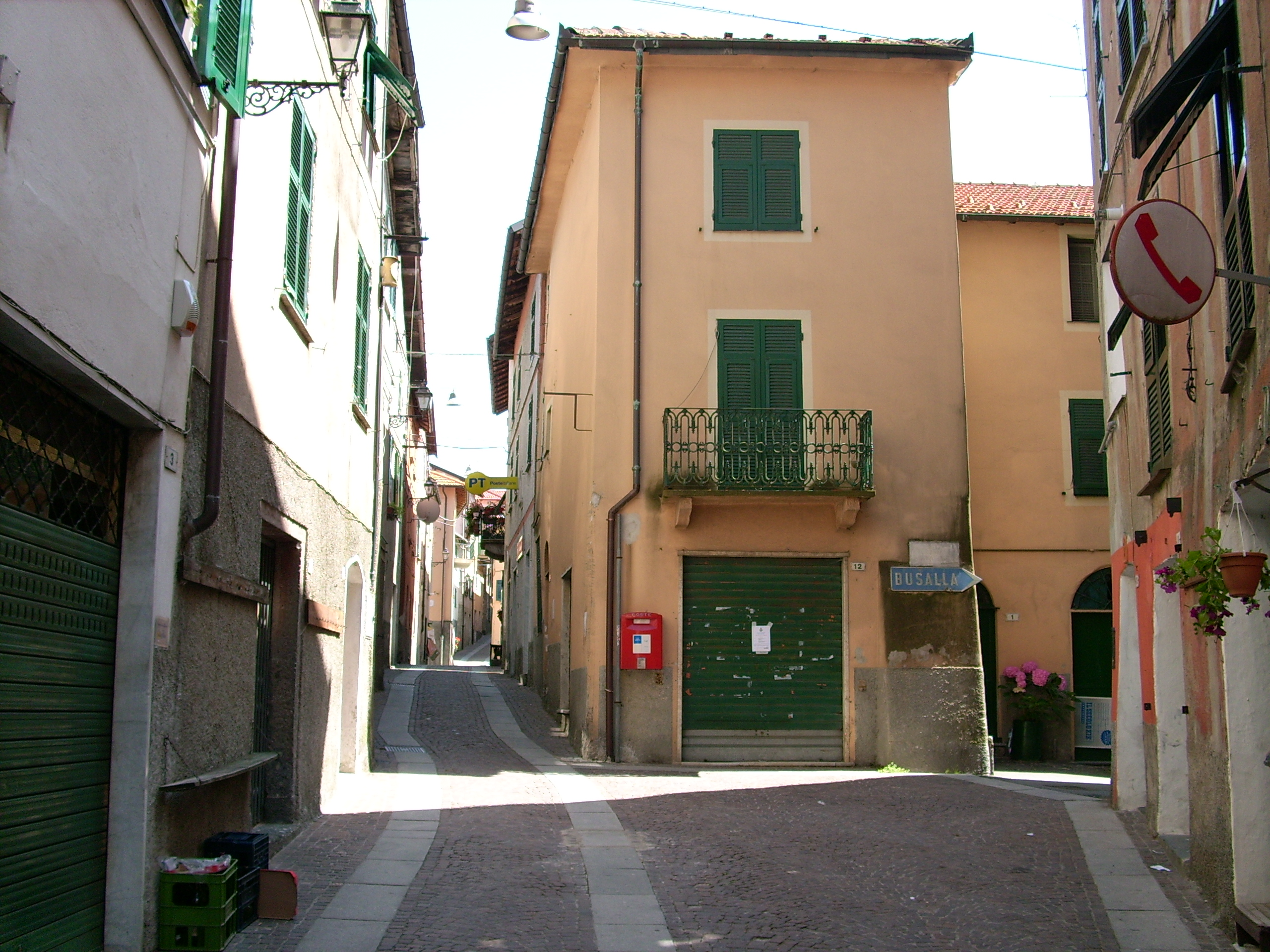 Centro storico di Crocefieschi, Liguria, Italia